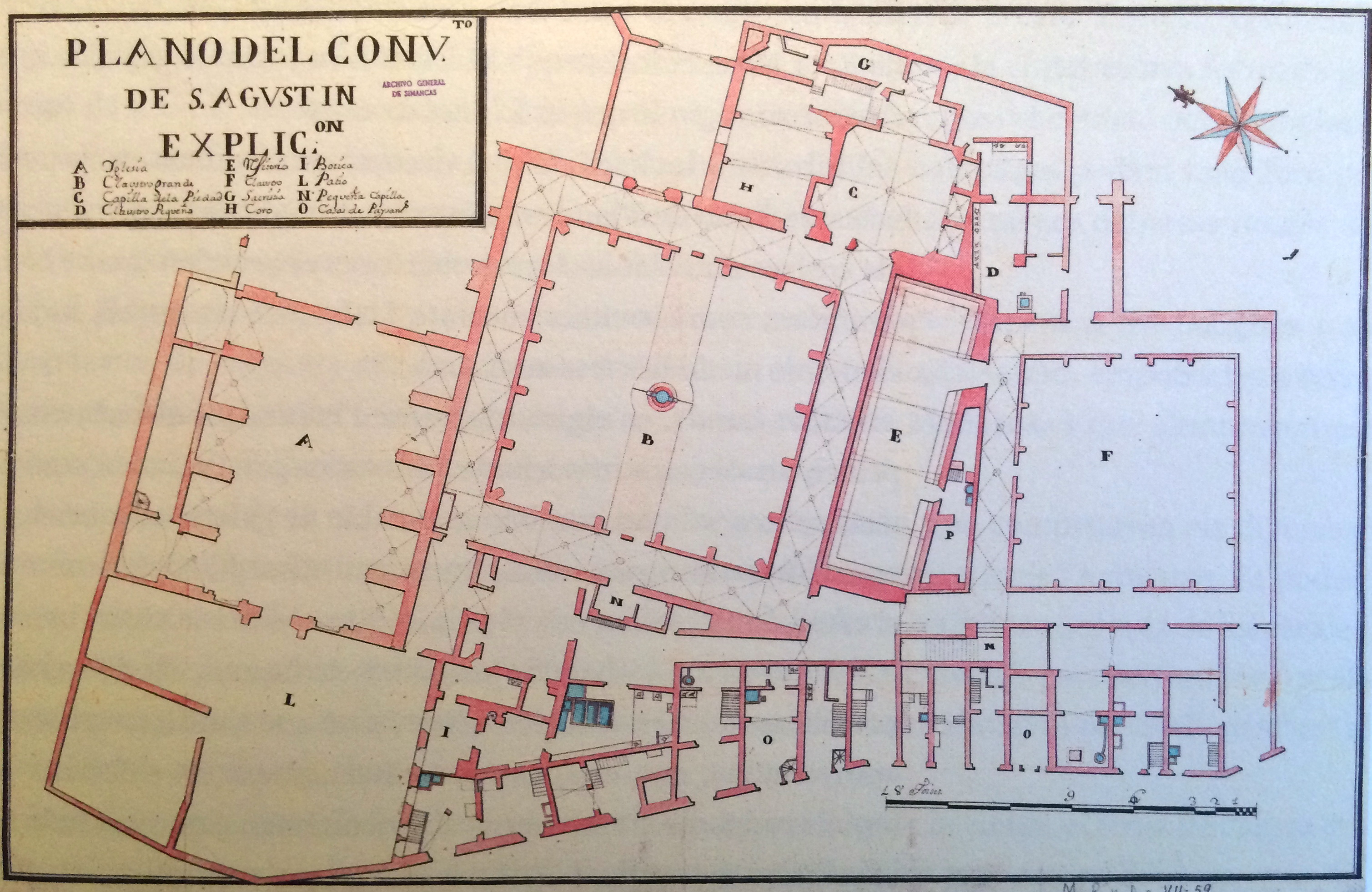 Plànol del convent de Sant Agustí Vell de Barcelona abans de la seva destrucció parcial del 1714-1716